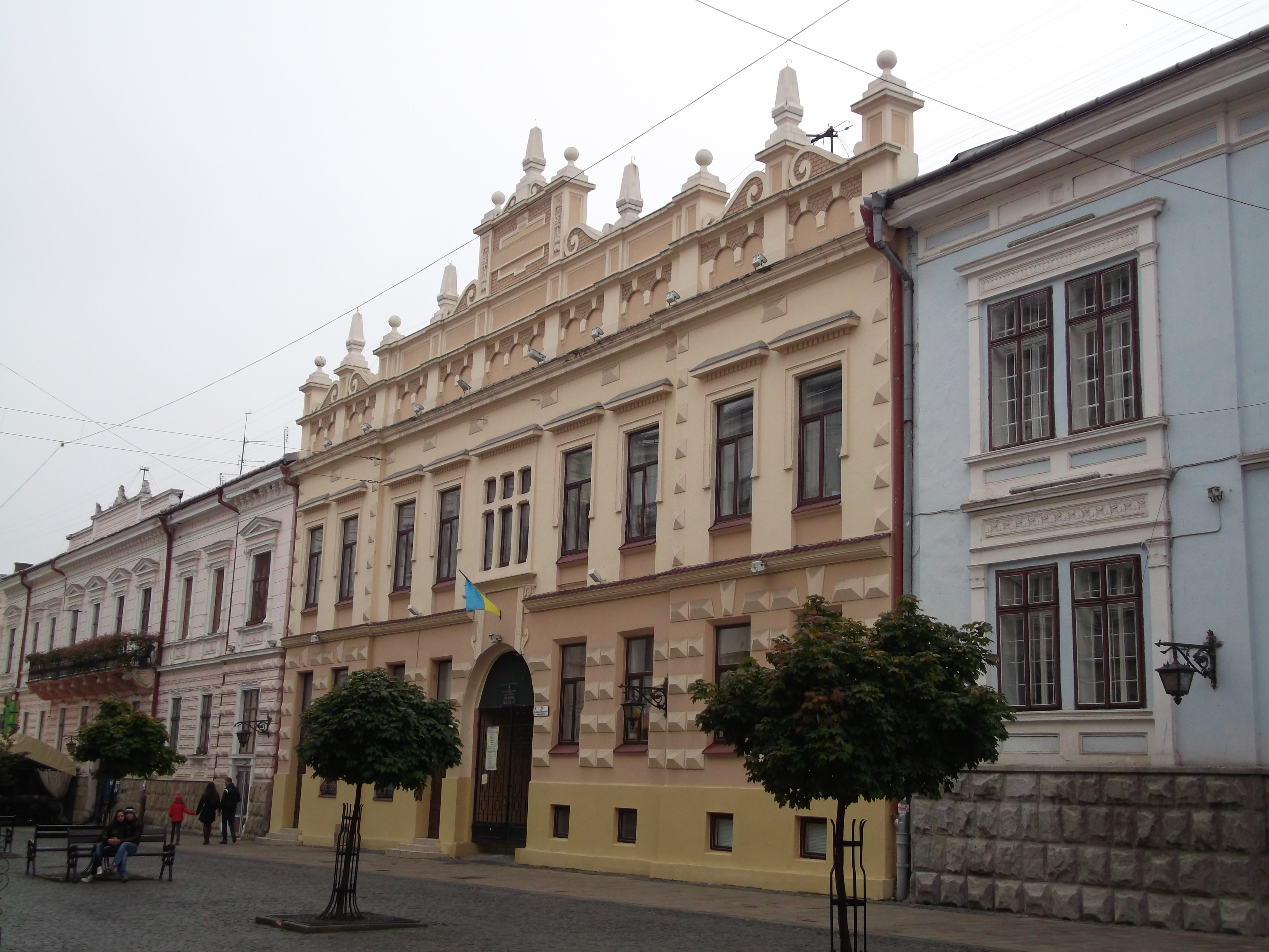 Польське товариство братньої допомоги, Чернівці, Кобилянської Ольги, 36